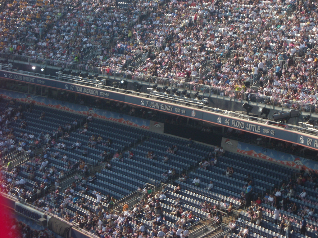 Tribune supérieure de l'INVESCO Field at Mile High